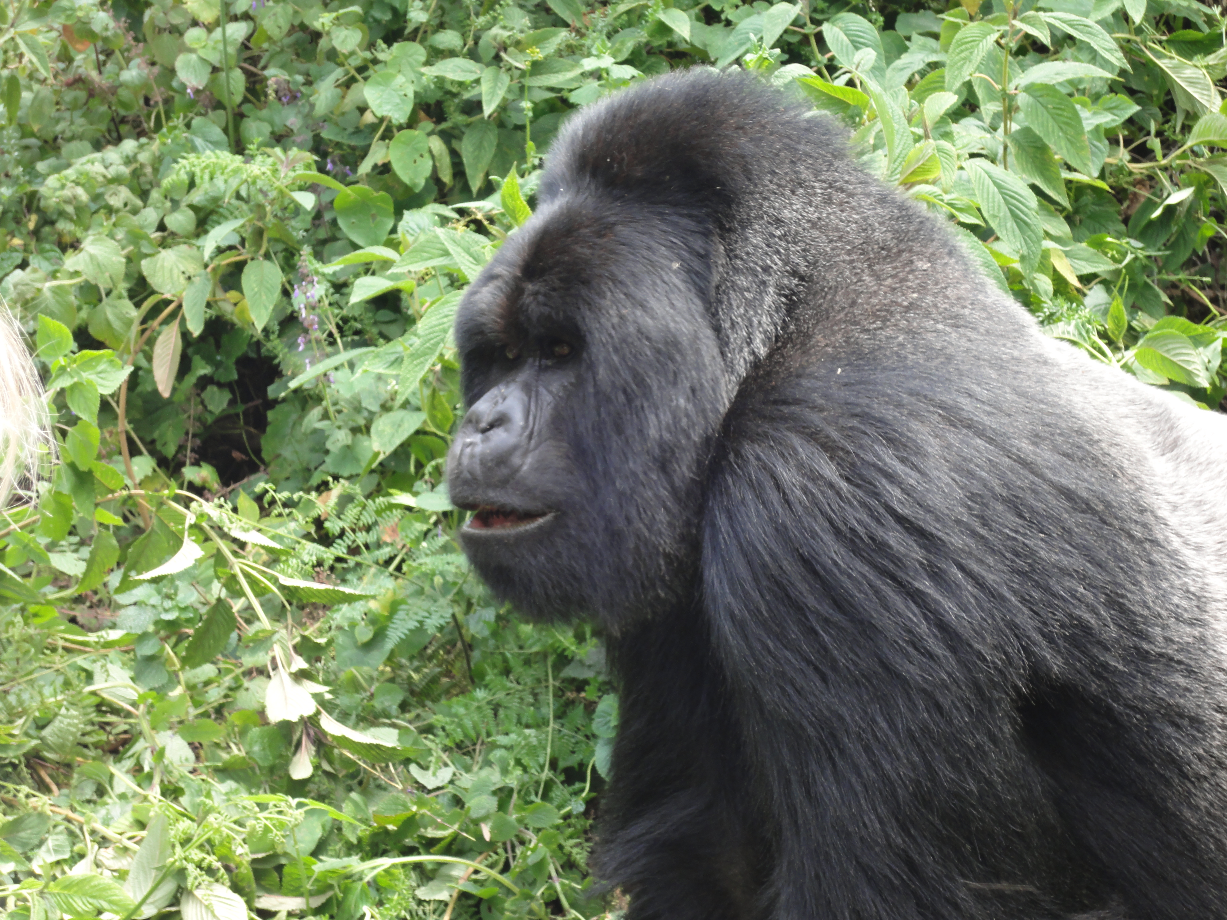 Der Silberrücken (Berggorilla) Guhonda, welcher die Berggorilla-Familie "Sabyinyo" auf dem gleichnamigen Vulkan in Ruanda anführt. Silverback (mountain gorilla) Guhonda, the dominant male of the "Sabyinyo" group in Rwanda.